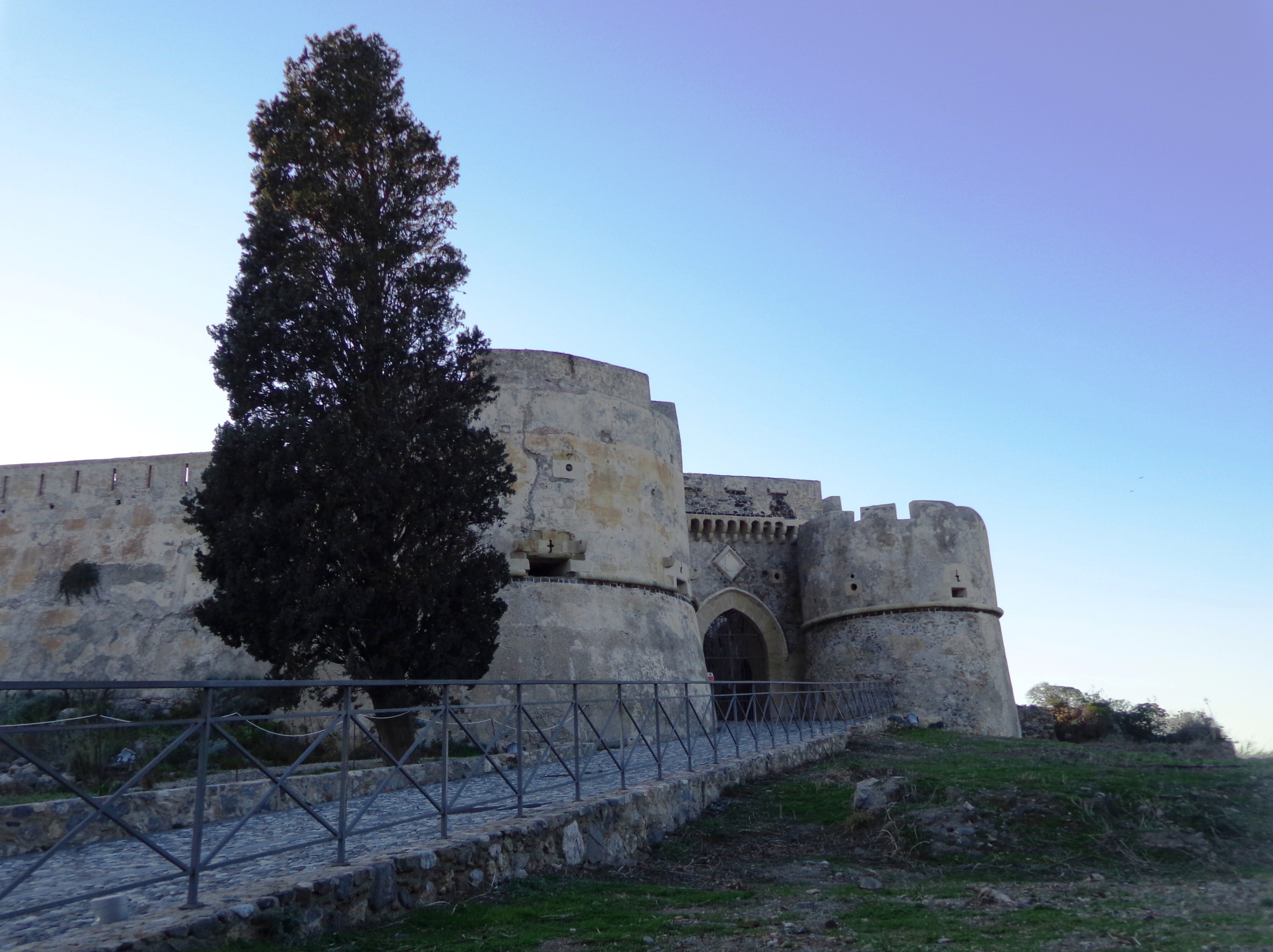 Porta Aragonese